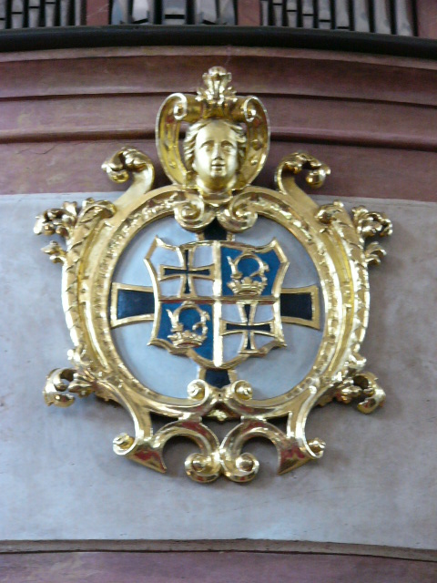 Wappen des Lamdkomturs Karl Heinrich von Hornstein an der Orgelempore der katholischen Kirche im Schloss des Deutschen Ordens